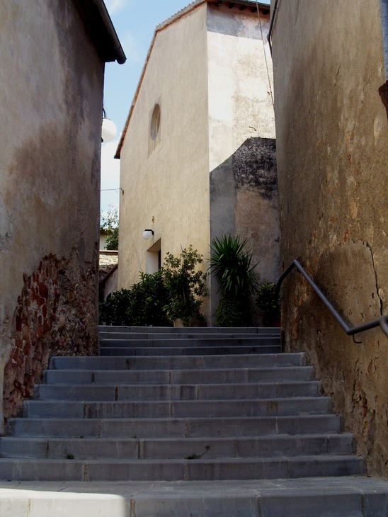 Facciata della Pieve di San Martino a Batignano (GR)